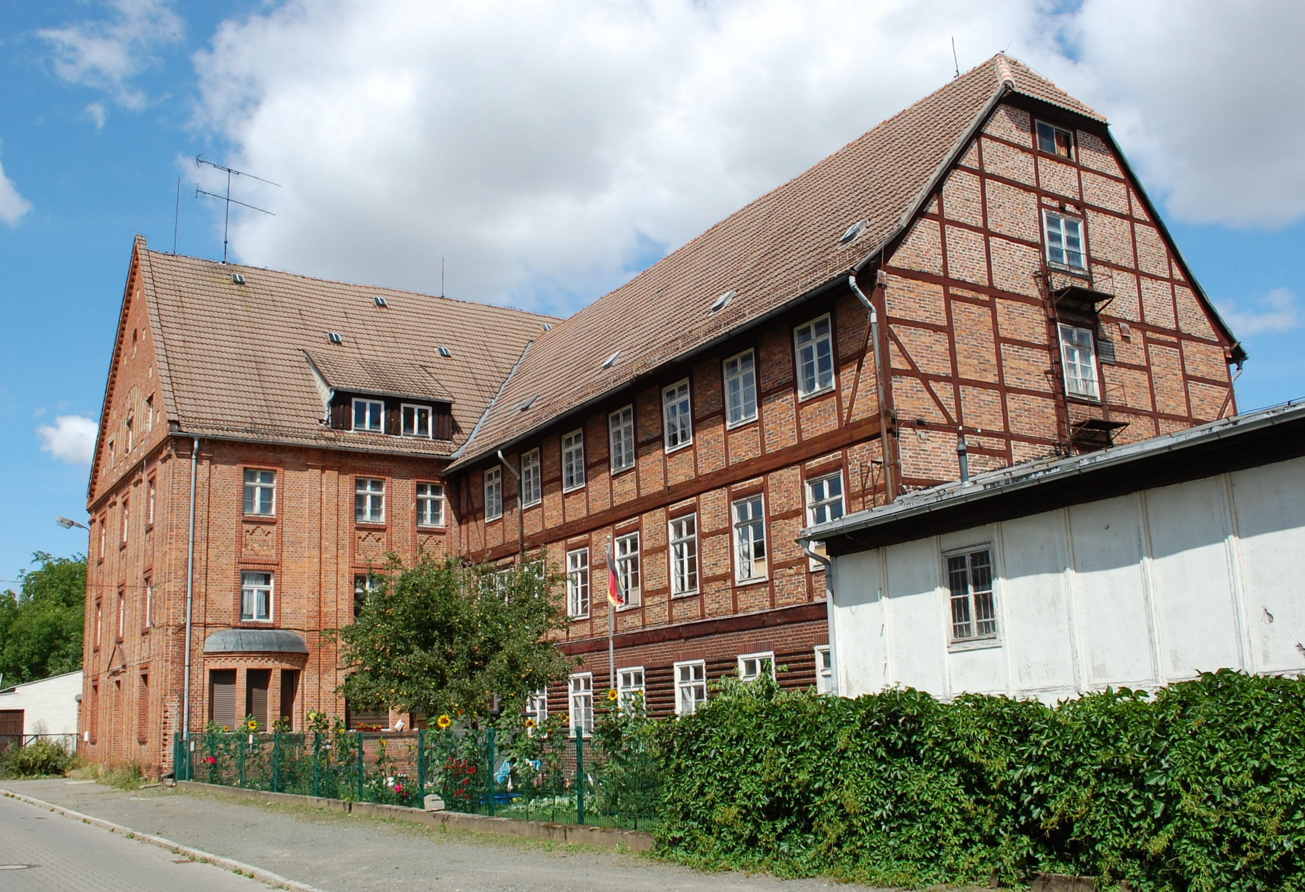 Haus Severinweg 7 in Quedlinburg